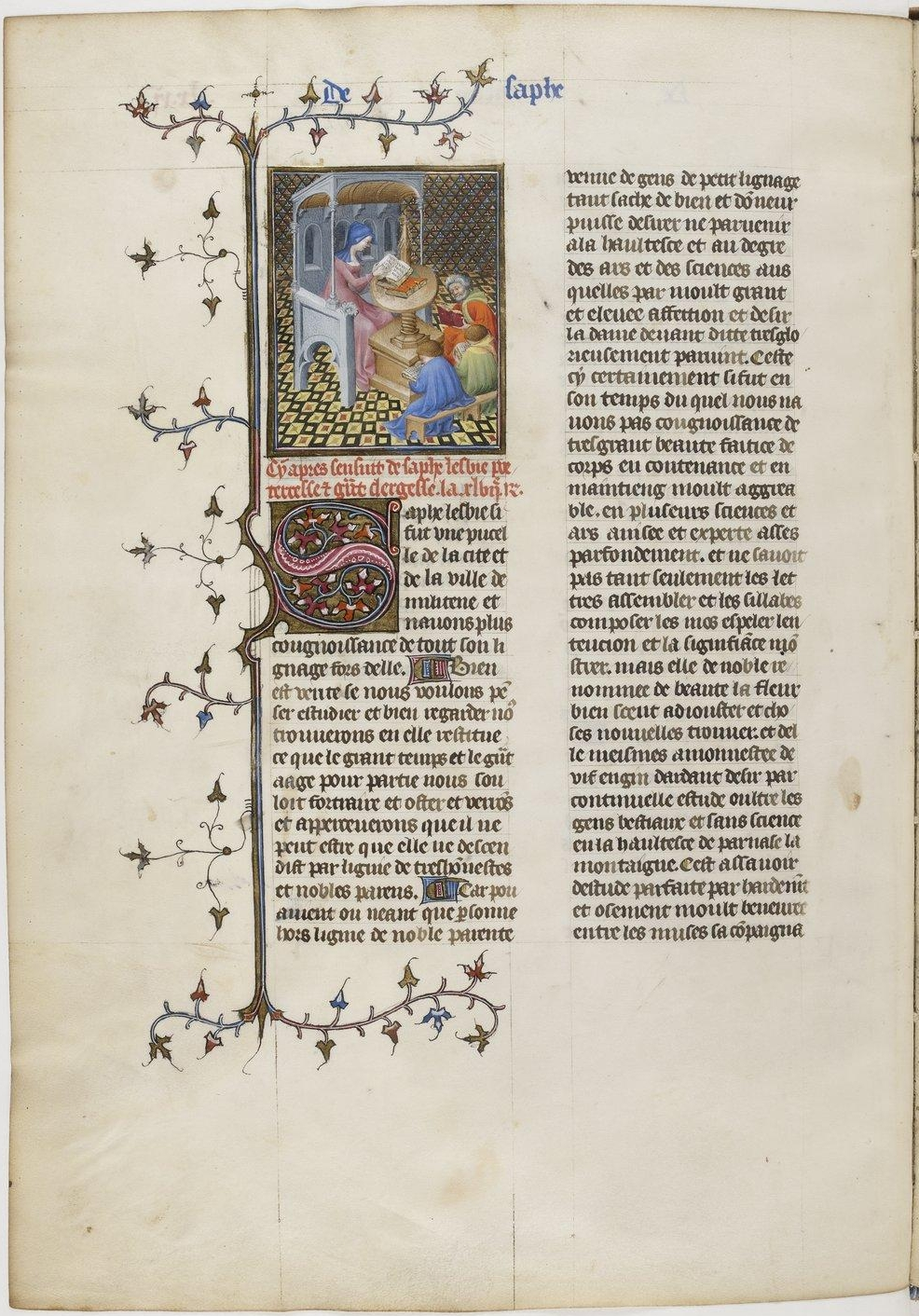 Giovanni Boccaccio , De Claris mulieribus , traduction anonyme en français Livre des femmes nobles et renommees. Manuscrit latin-français. 1403 f. 71v (XLVII) : Sappho, à son pupitre, devant ses disciples